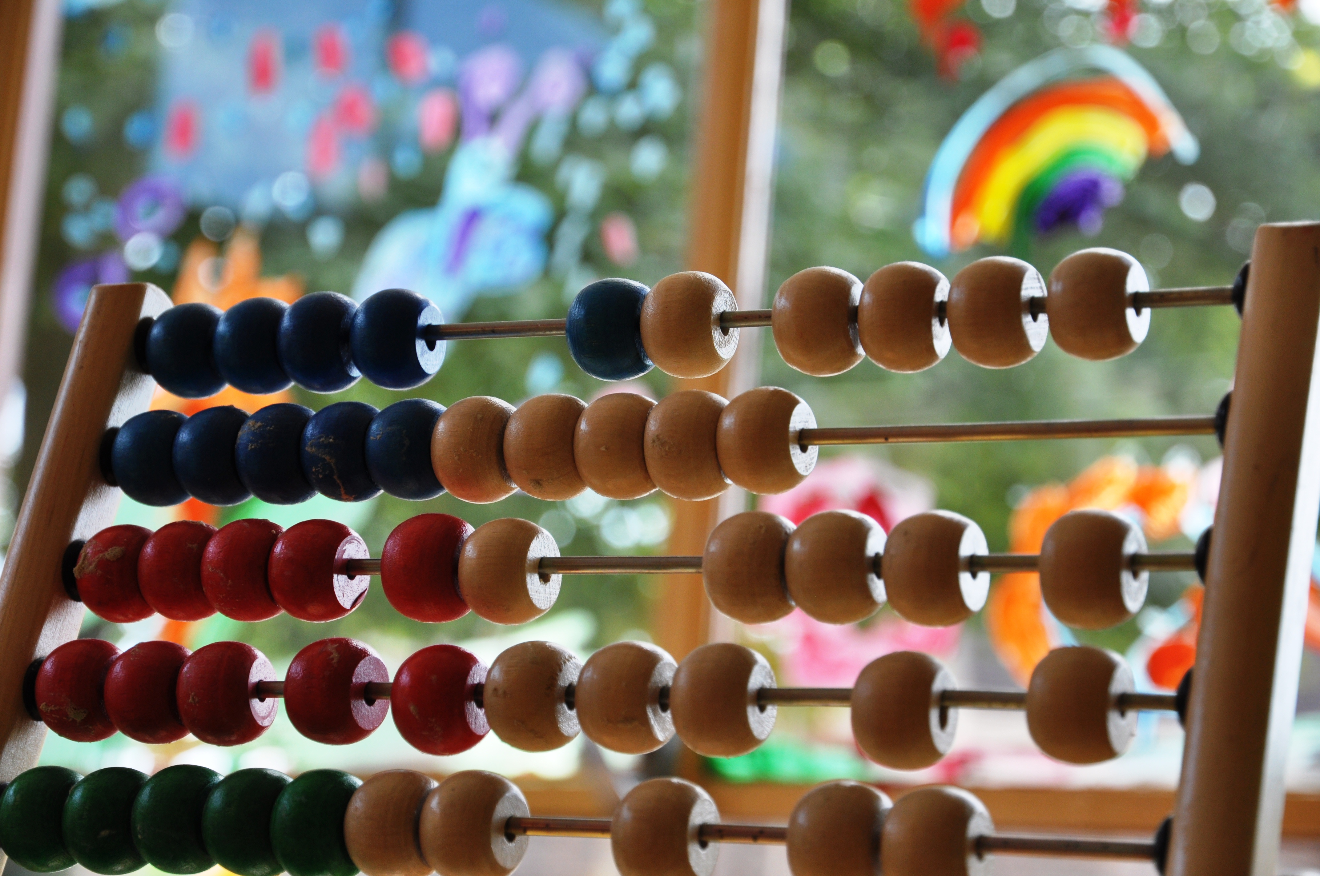 Telraam op de Werkplaats Kindergemeenschap in Bilthoven.